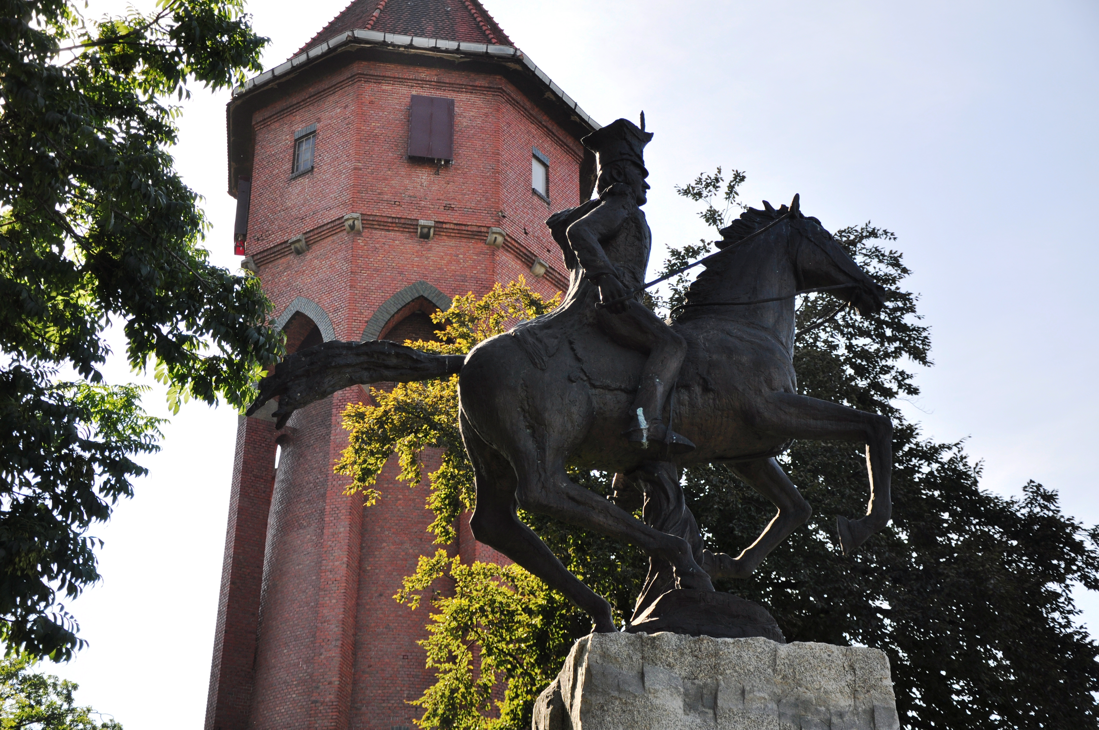 Sroda, Denkmal, Wasserturm